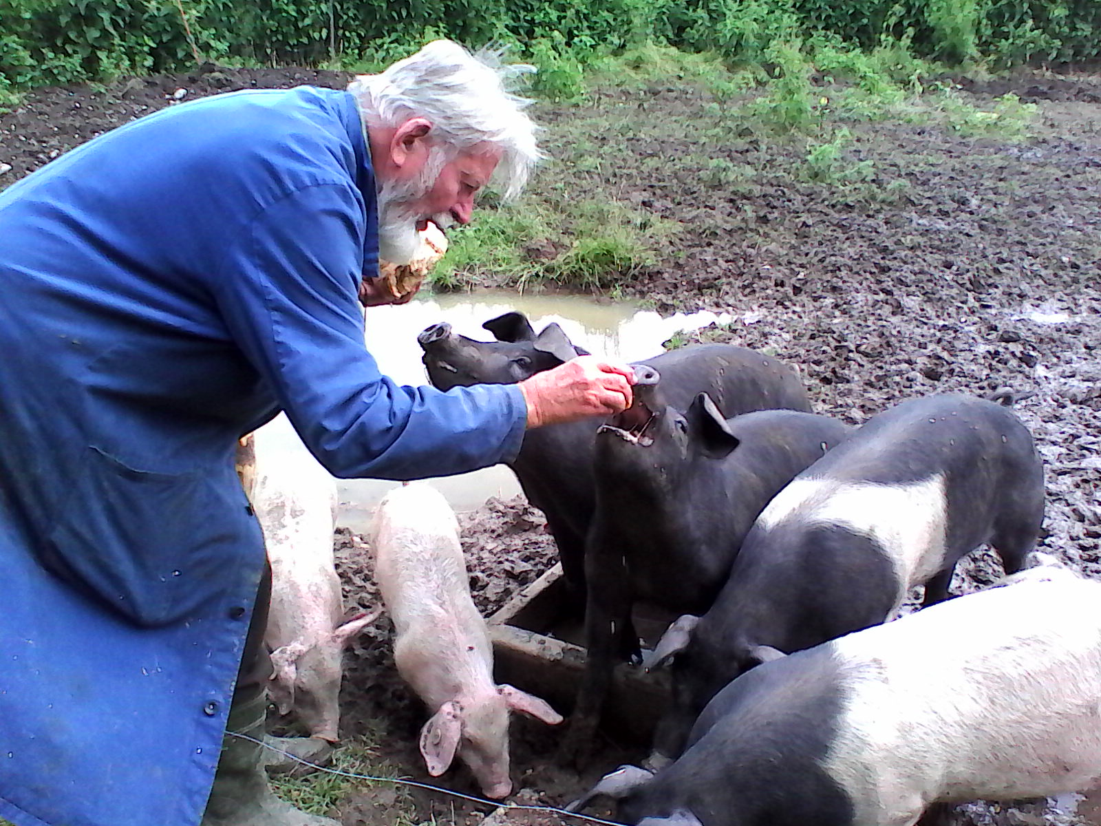 Volker Zahn füttert Sschwäbisch Hälisches Schwein